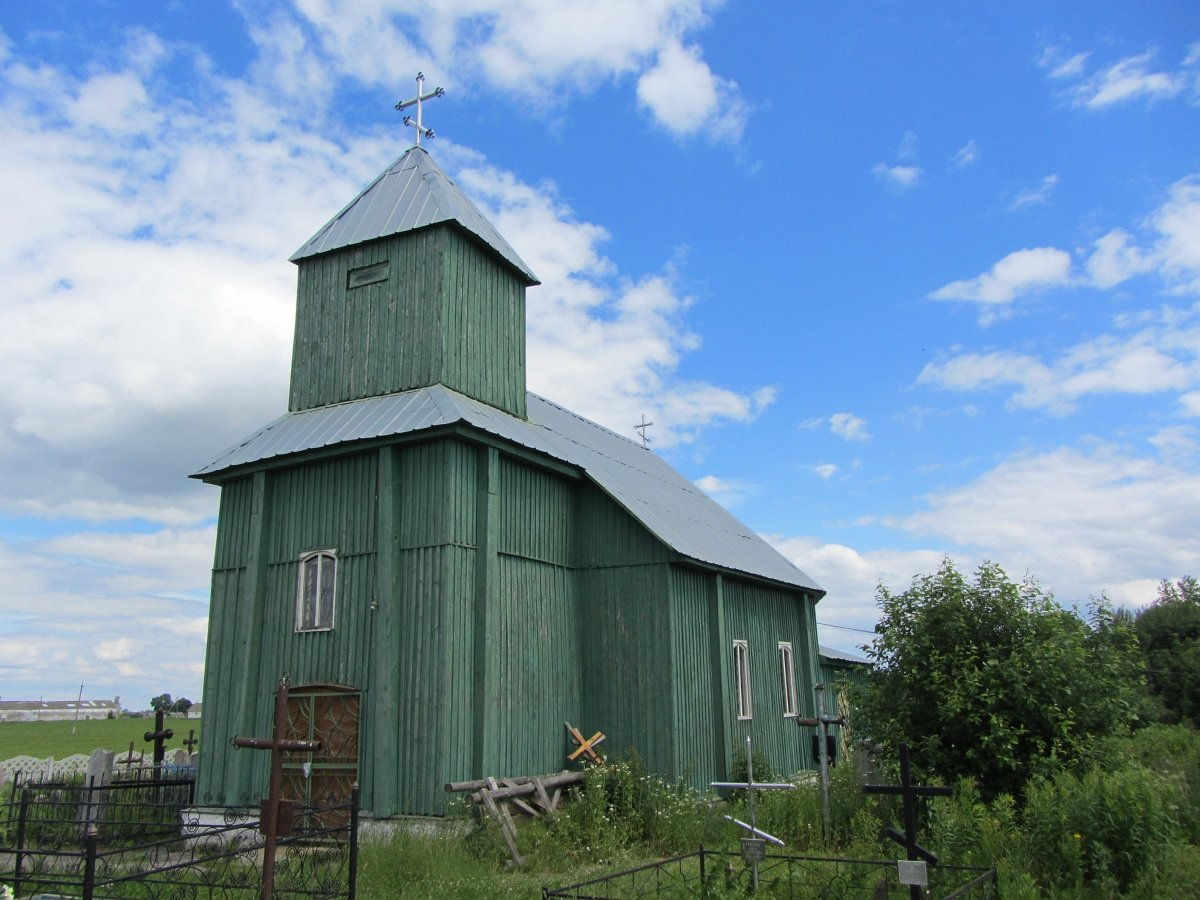 Дабрынёва. Свята-Раства-Багародзіцкая царква